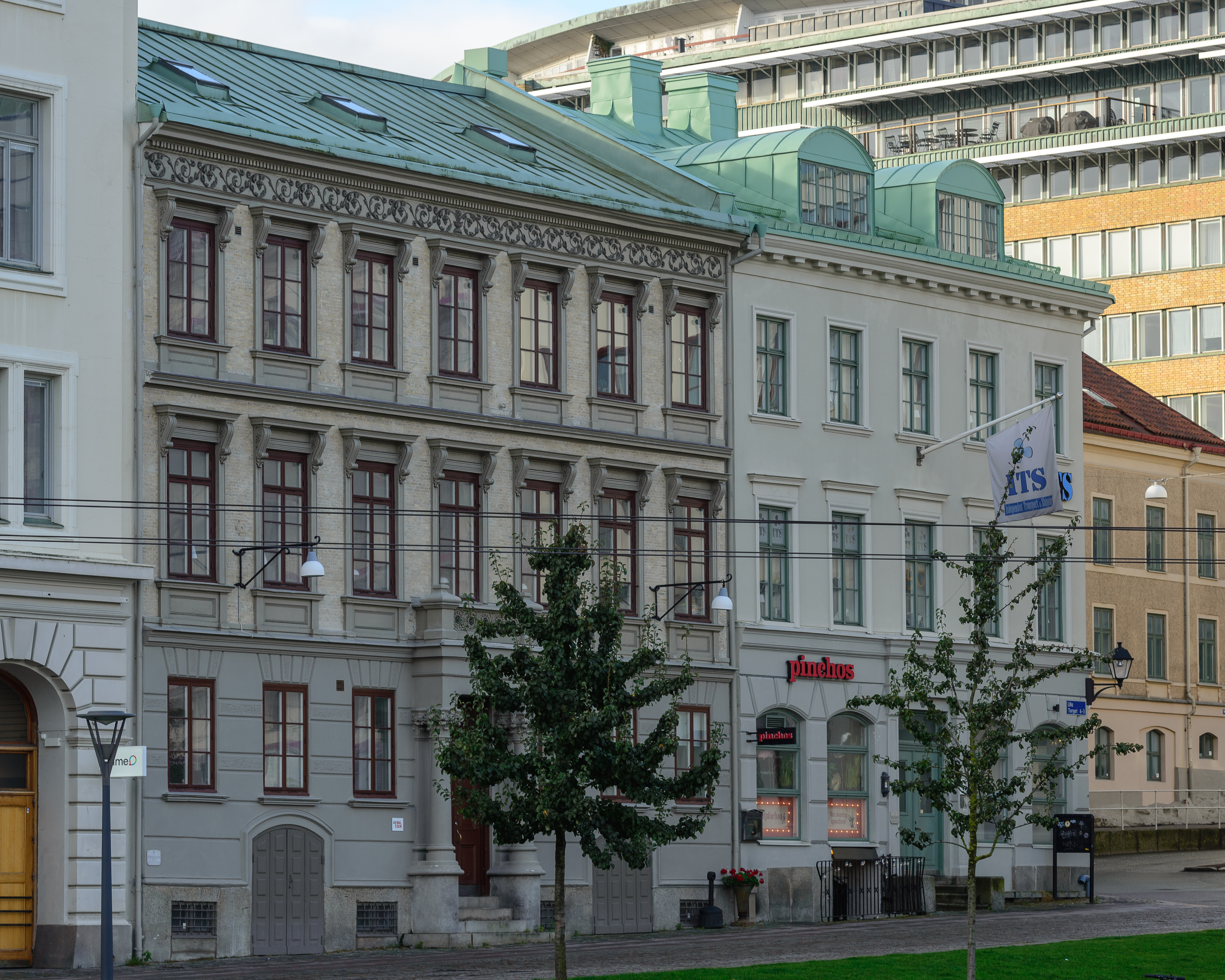 Lilla torget 3 (höger) och 4 i Göteborg.